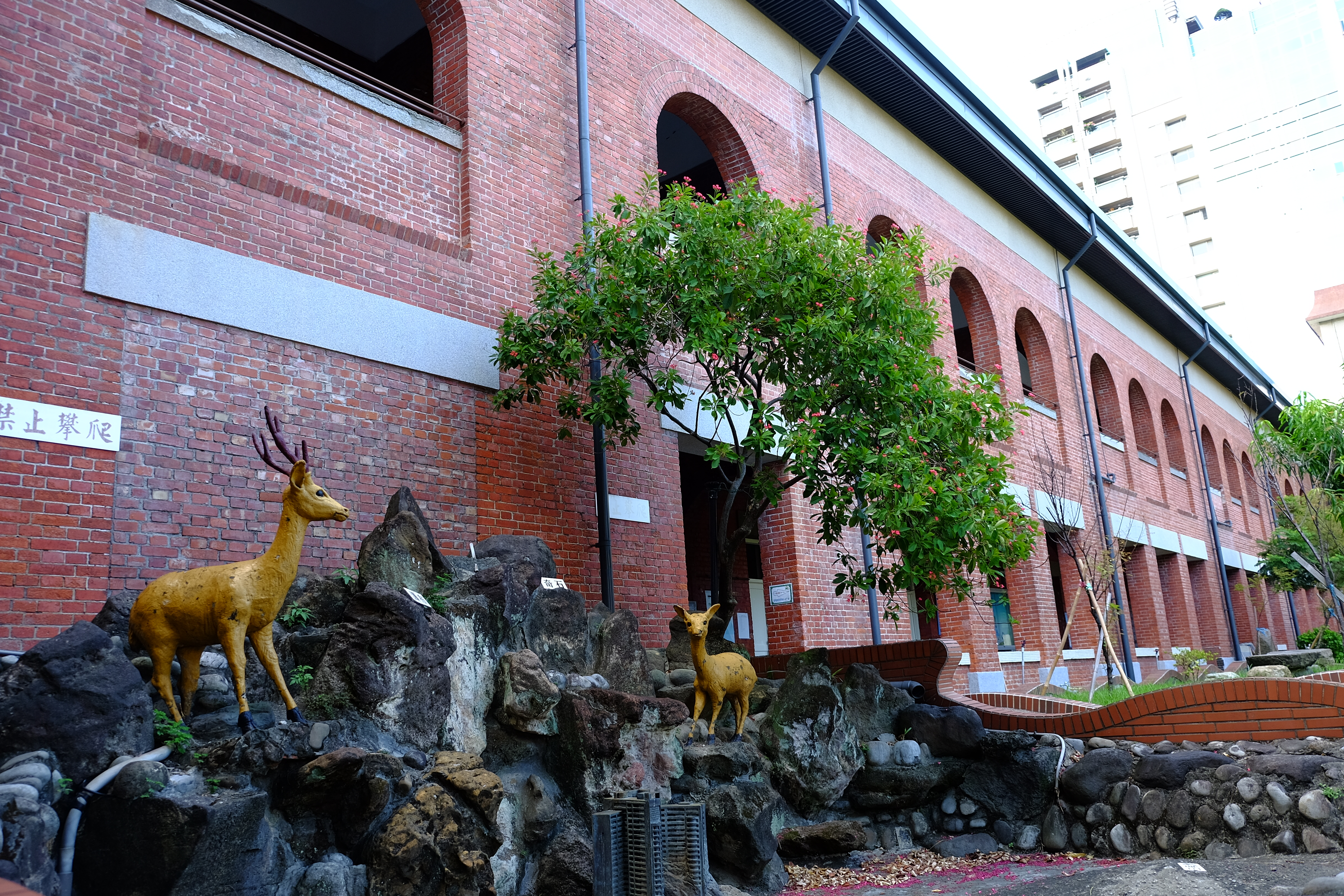 臺北市大同區日新國民小學 Taipei Municipal Rixin Elementary School